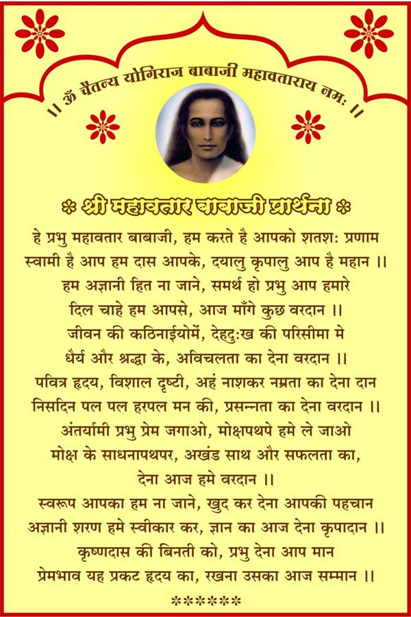 my own composition